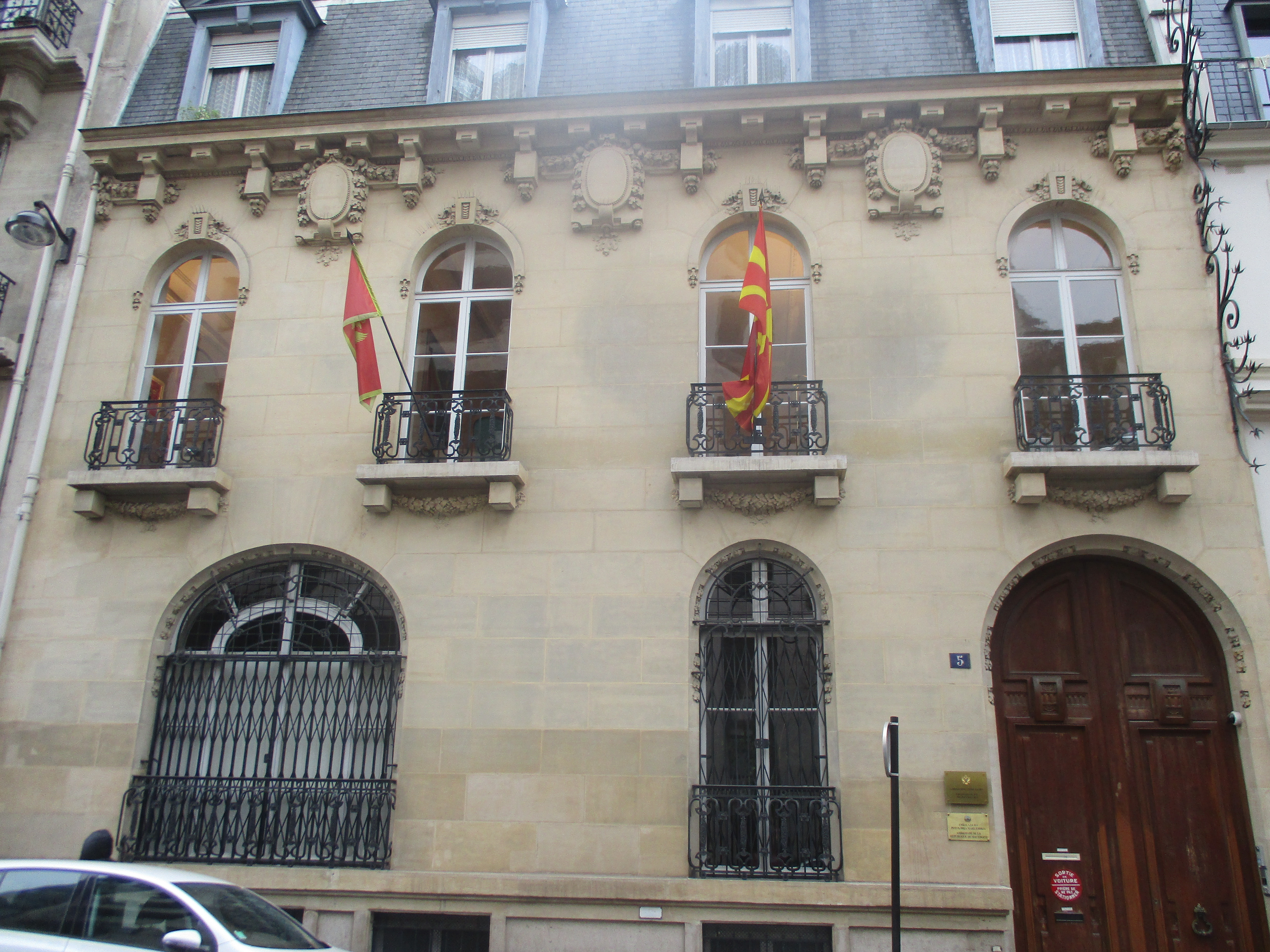 Ambassade de la République de Macédoine, 5 rue de la Faisanderie, Paris XVIe.